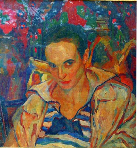 Ion Theodorescu-Sion - Portretul pictoriţei Lola Schmierer Roth, ulei pe carton, 49x47 cm, deţinător: Muzeul de Artă Vizuală din Galaţi.